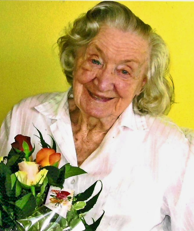 Josefina Napravilová